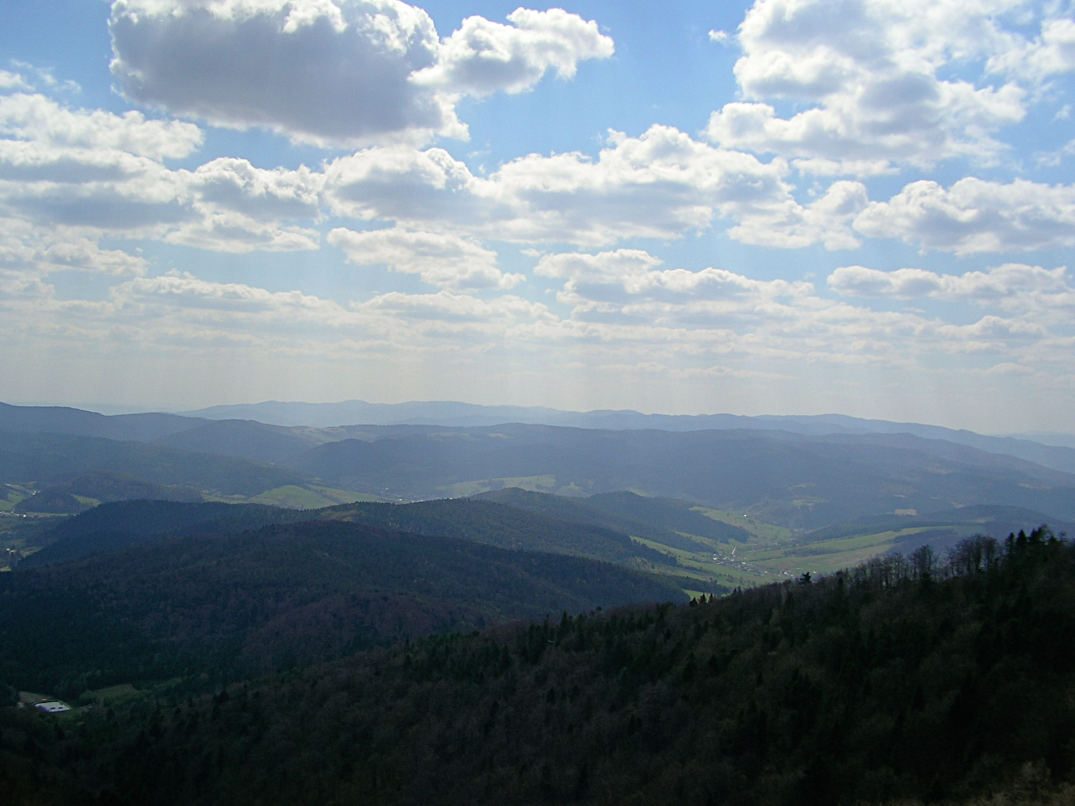 Park krajobrazowy Popradzki Park Krajobrazowy.